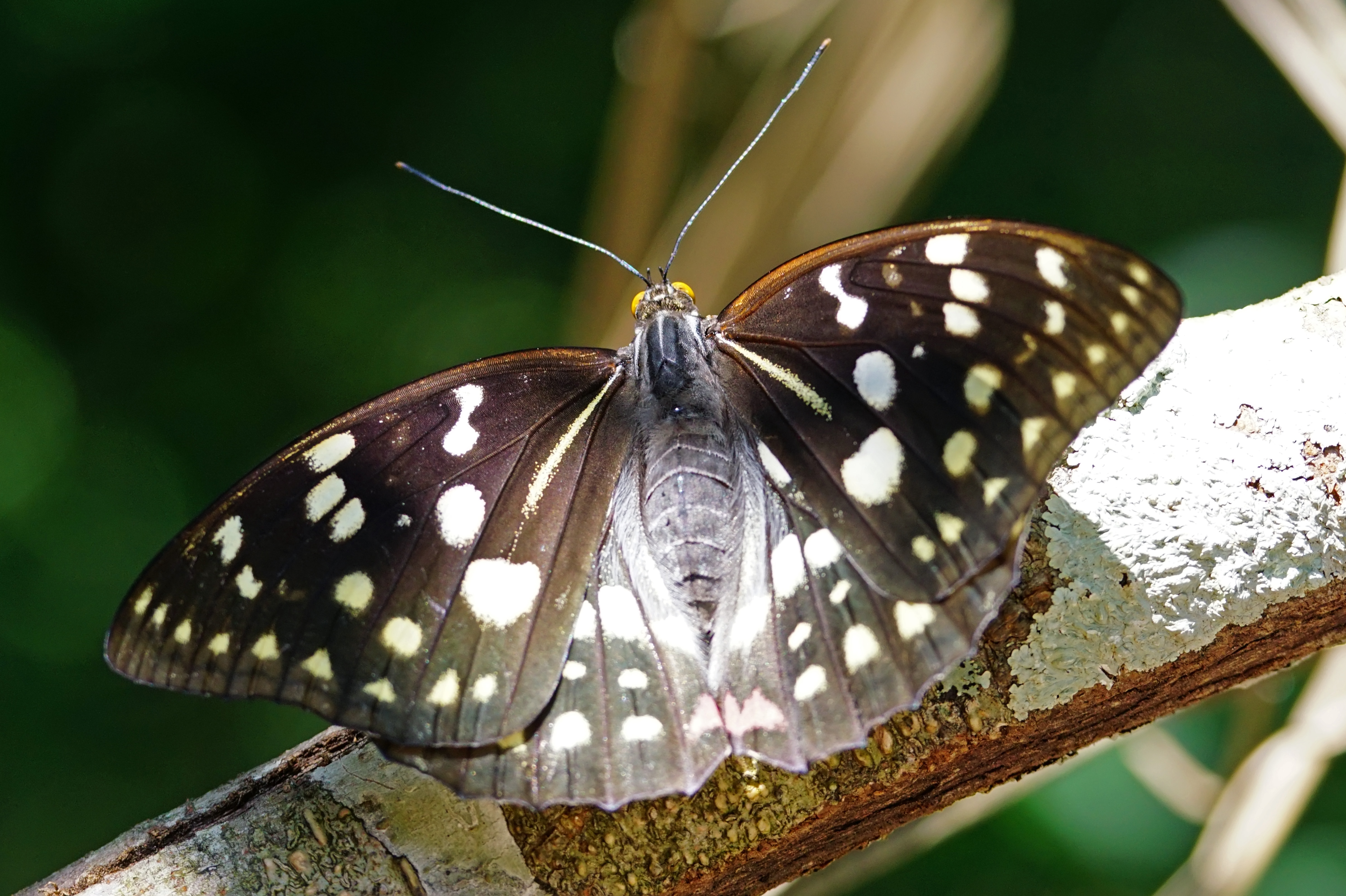 大紫蛺蝶 Sasakia charonda formosana